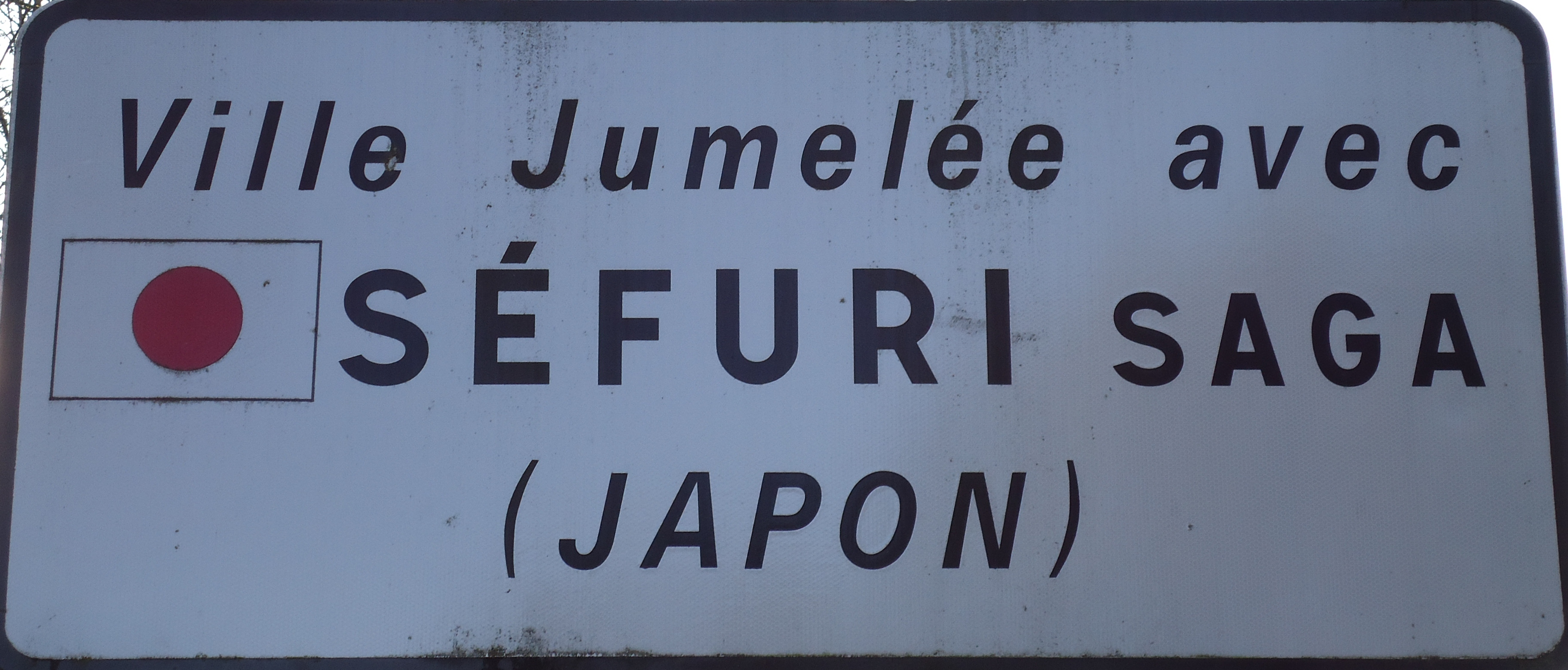 Pancarte jumelage beaucourt